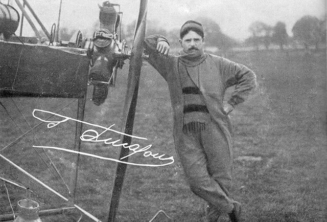 Ernest Failloubaz in ~1910